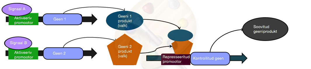 Loogikavärav NAND